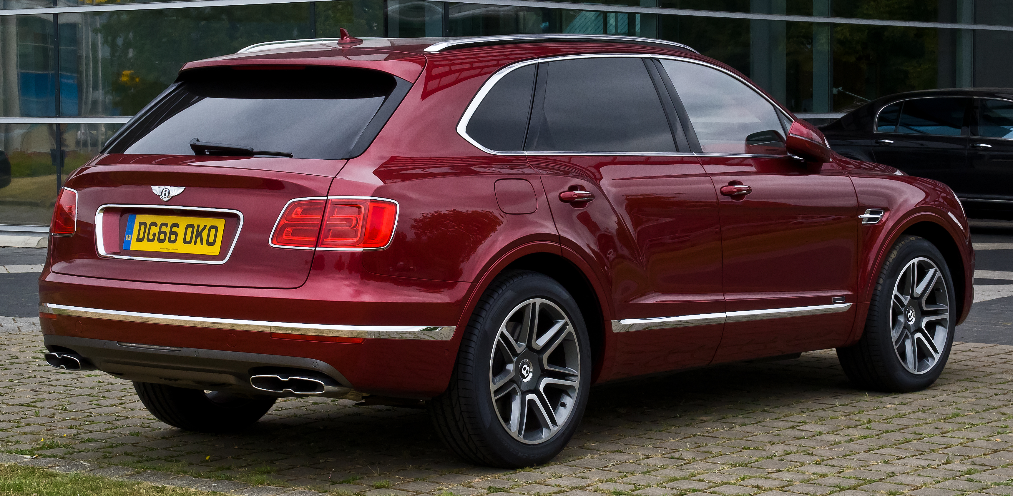 Bentley Bentayga Diesel